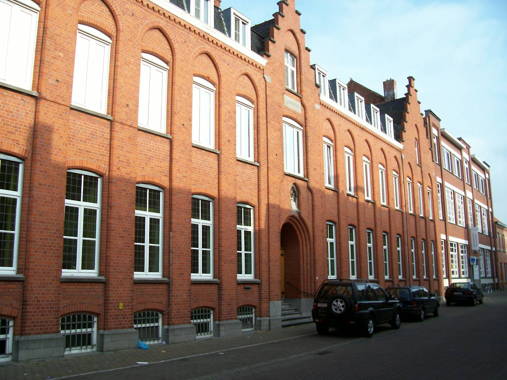 Dit is de voorgeven van het klooster van Ingelmunster